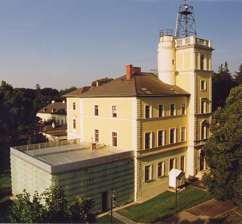 ZAMG Wien auf der Hohen Warte in Wien-Döbling